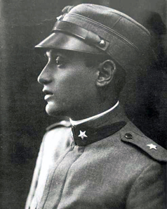 Nonni foto